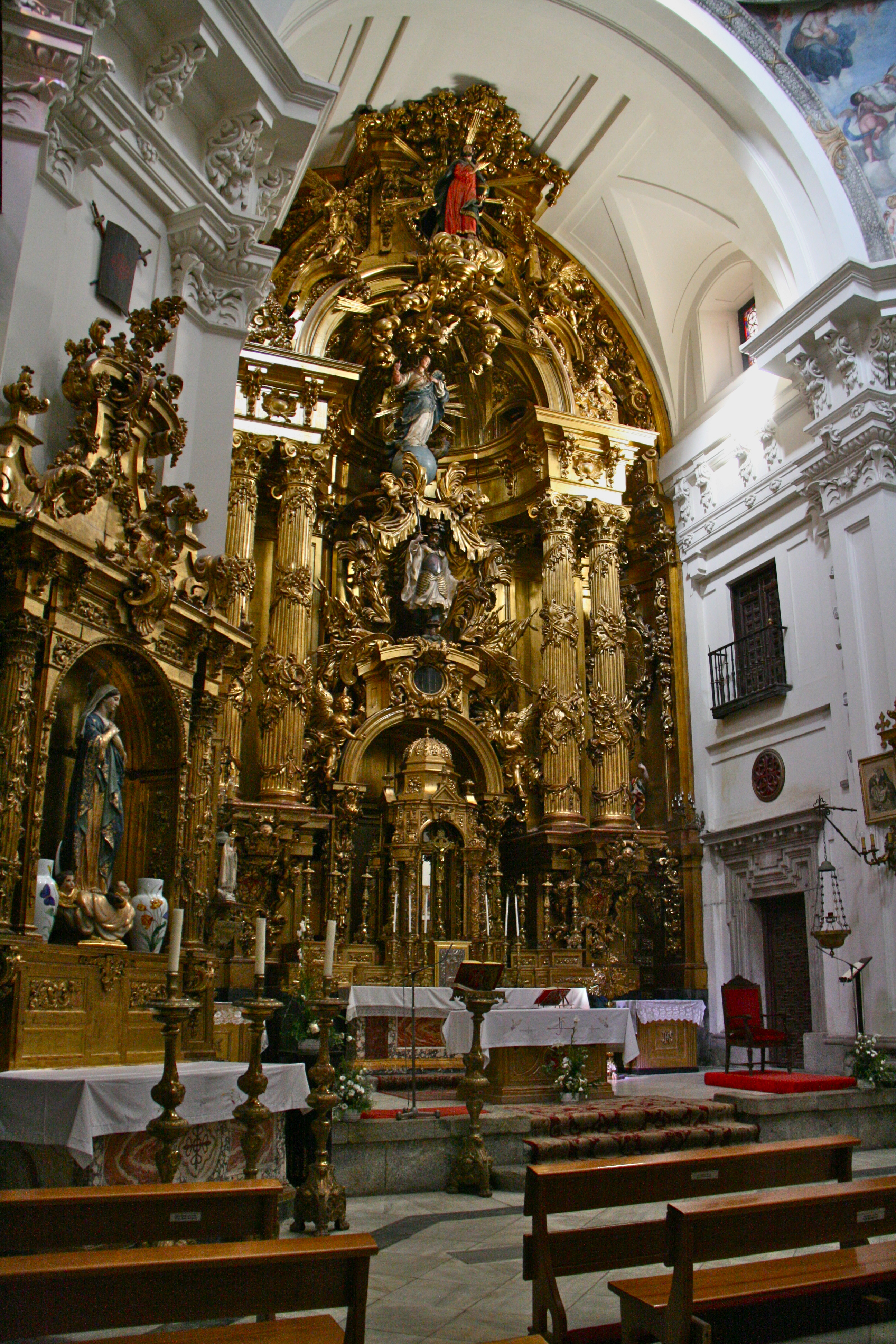 Retablo de José de Churrigera - Iglesia de la Concepción Real de Calatrava, Madrid